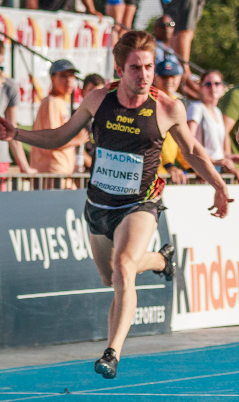 Diogo Antunes (POR). 100m (semifinal 2). IAAF World Challenge. Meeting Madrid 2017. Moratalaz, Madrid.